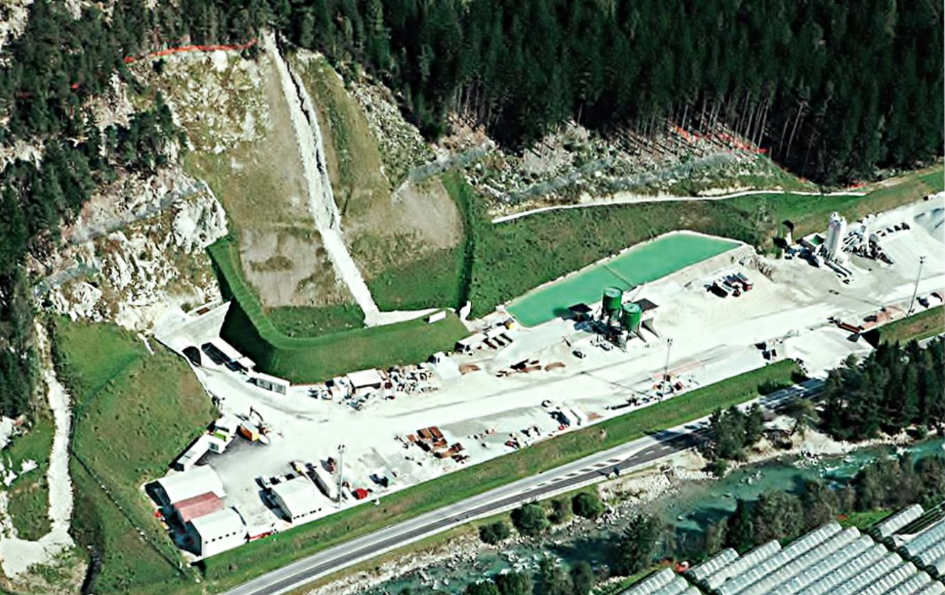 Cantiere BBT a Mules nell'estate 2008